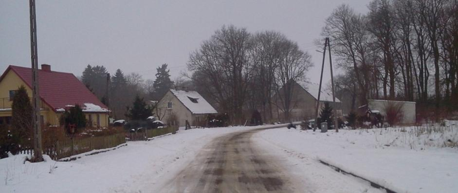 Widok na Orle od strony Wiórkowa